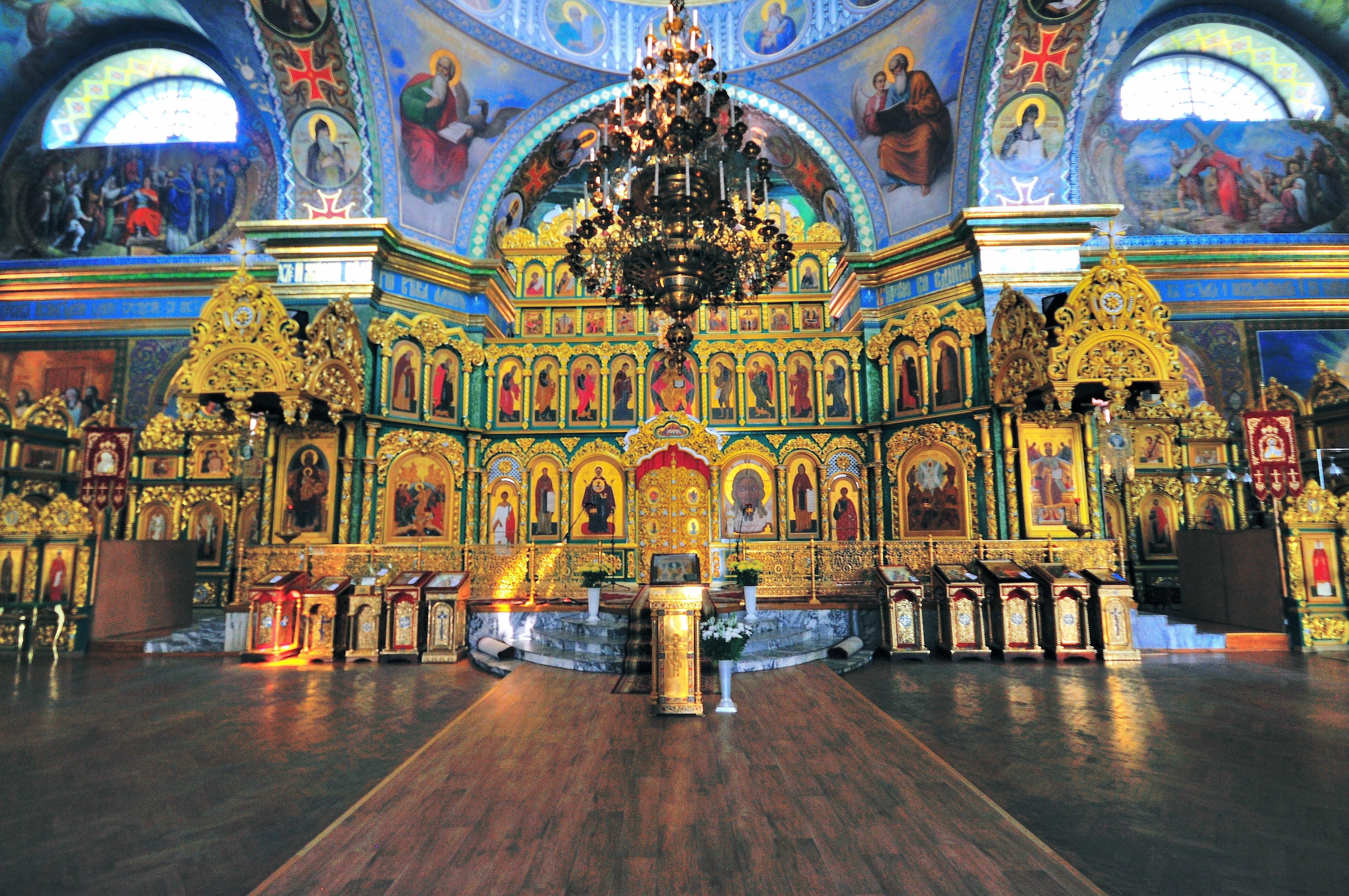 Спасо-Преображенський собор (мур.), Біла Церква, вул.Гагаріна, 10